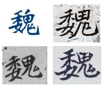 印刷魏体和手写魏碑的比较。